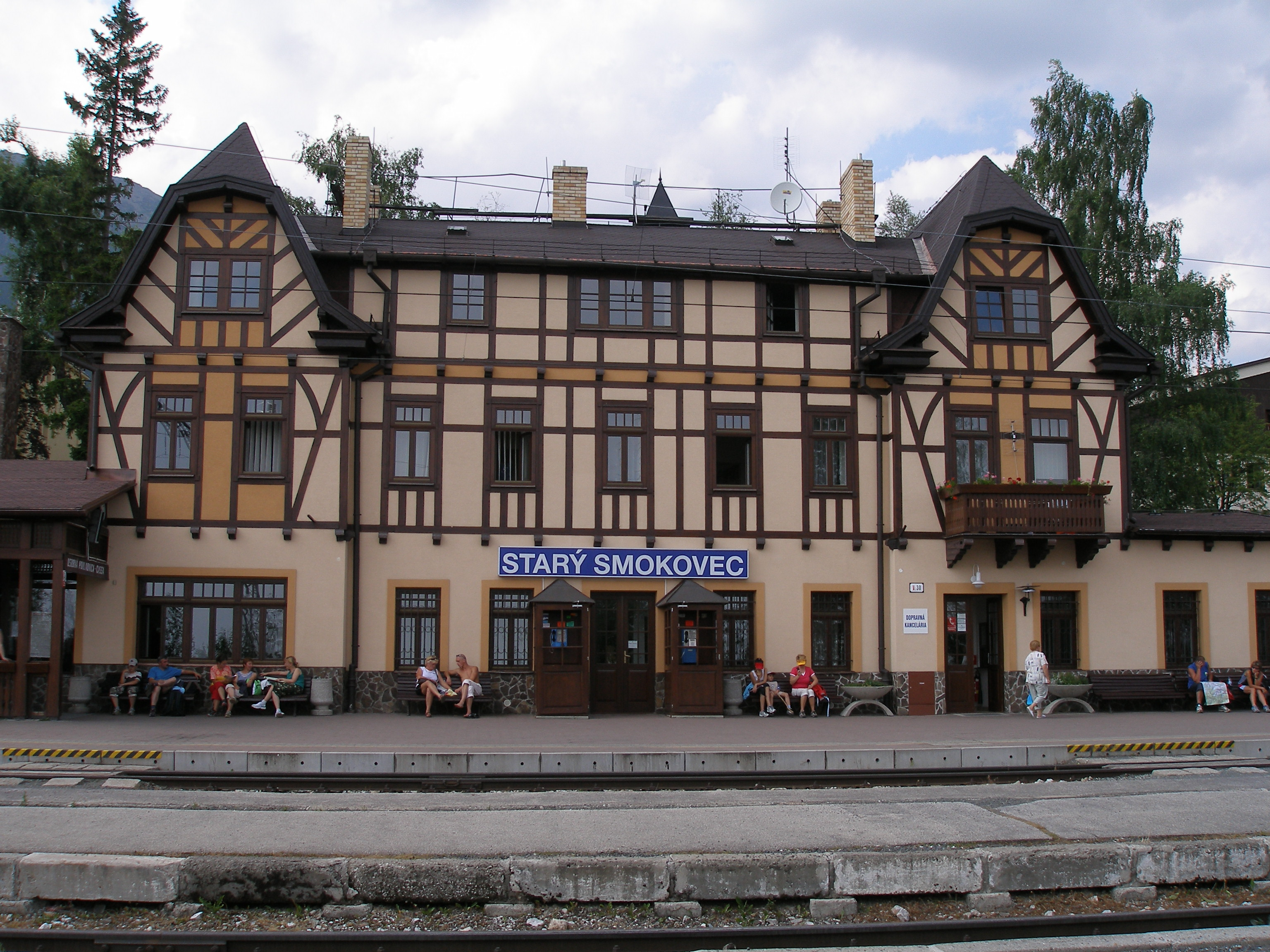 Tatranská osada Starý Smokovec, Slovakia